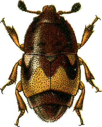 This file has been extracted from another file: Jacobs18.jpg